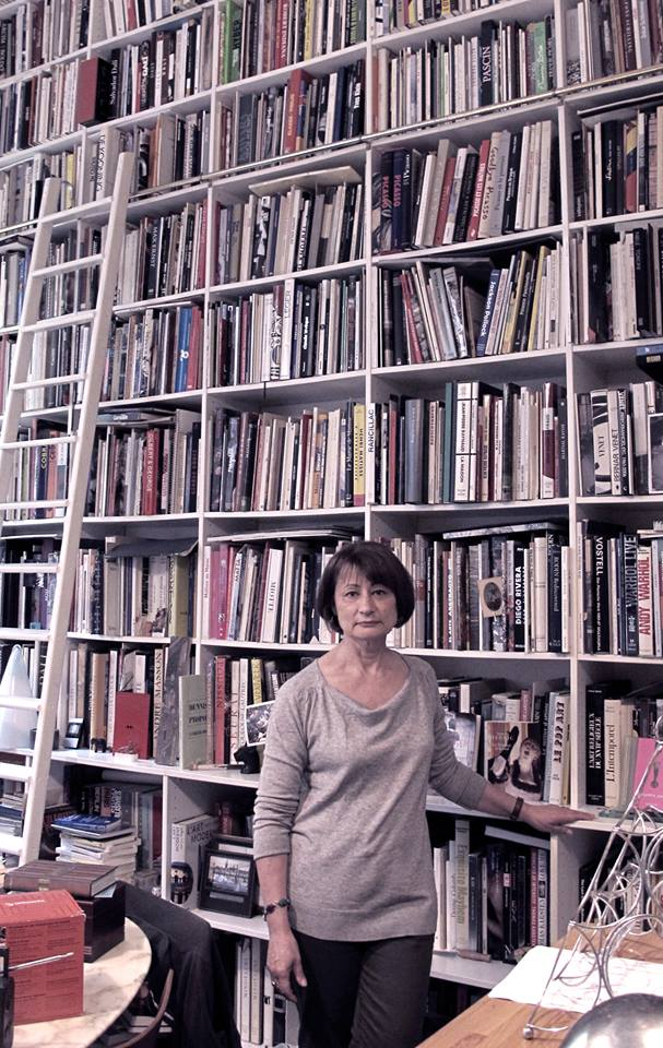 Catherine Millet chez elle